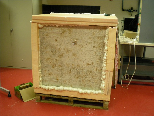 Cellule de tests thermiques d'une plaque de liant papier réalisée par des élèves du BTS domotique du Lycée Charles de Gaulle à Muret dans le cadre du projet papercrete de la DP6H du CSES Jean Lagarde.